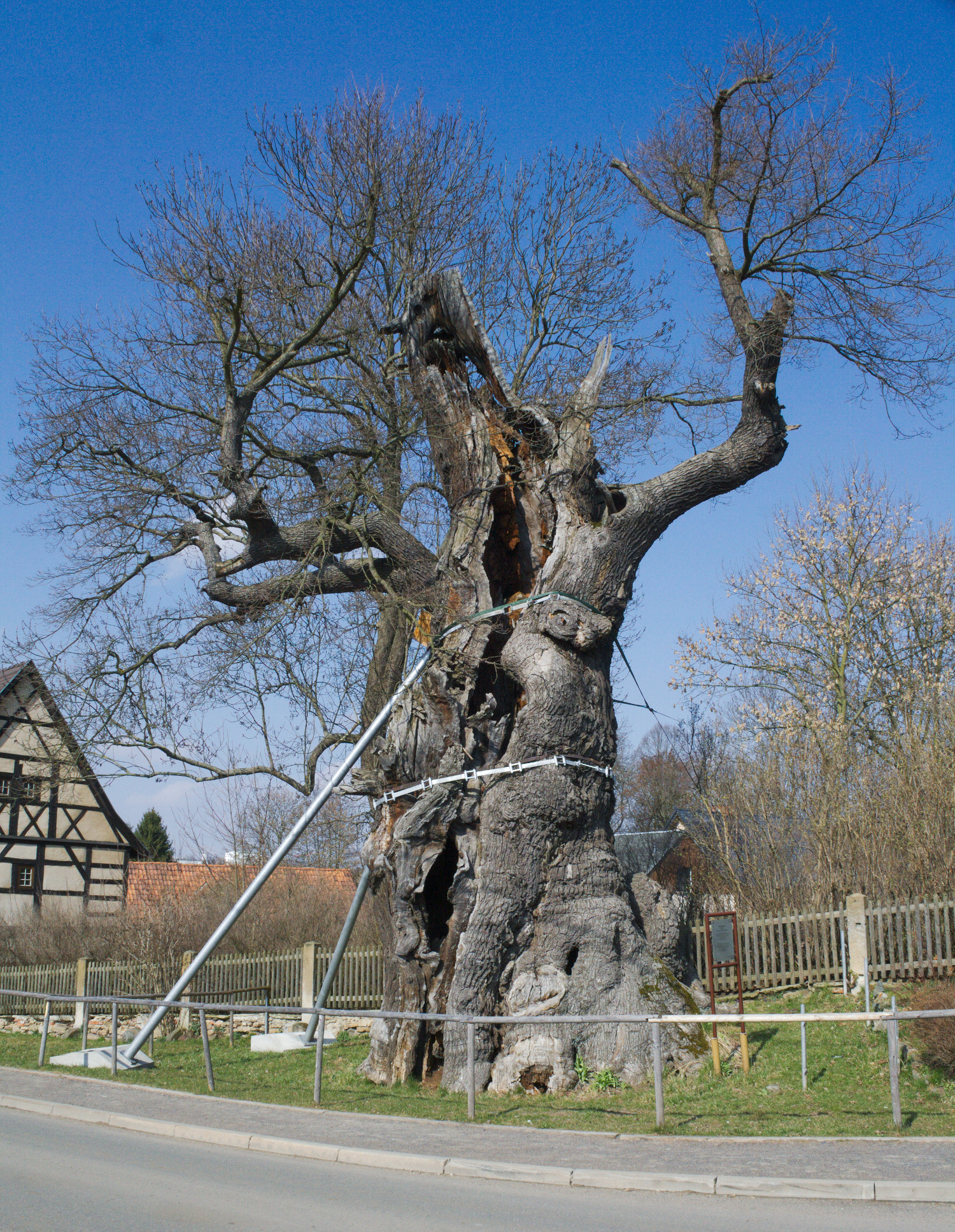 Grabeiche in Nöbdenitz (Thüringen)